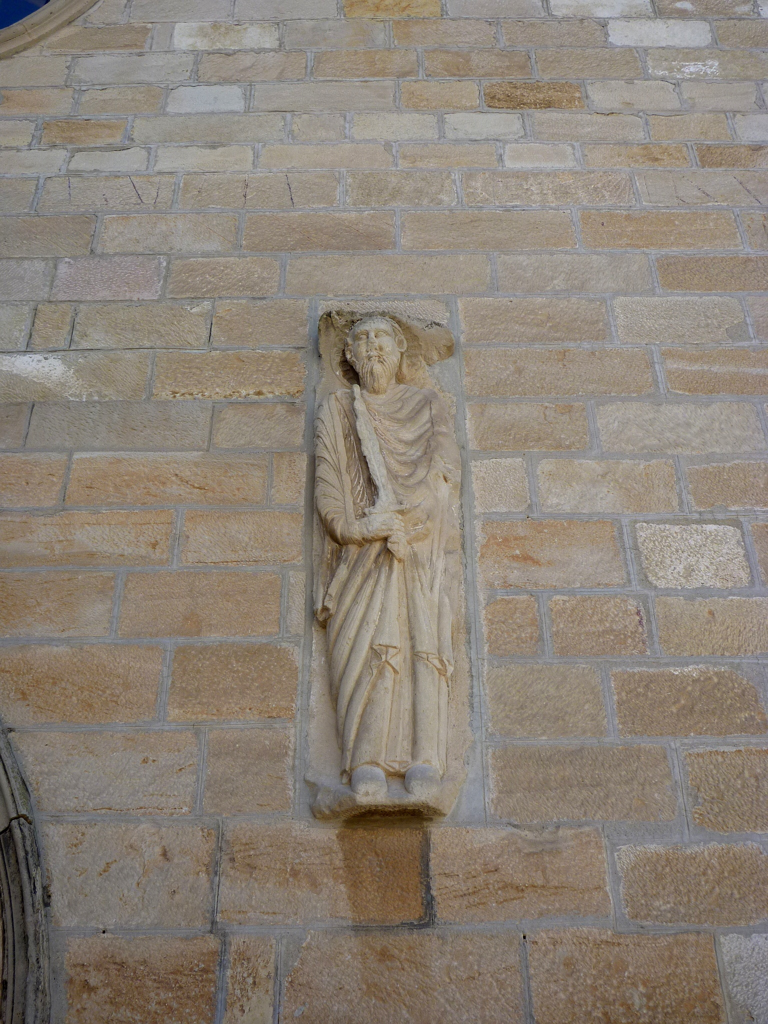 Església de Sant Pau de Narbona (Anglesola): escultura a la façana de ponent